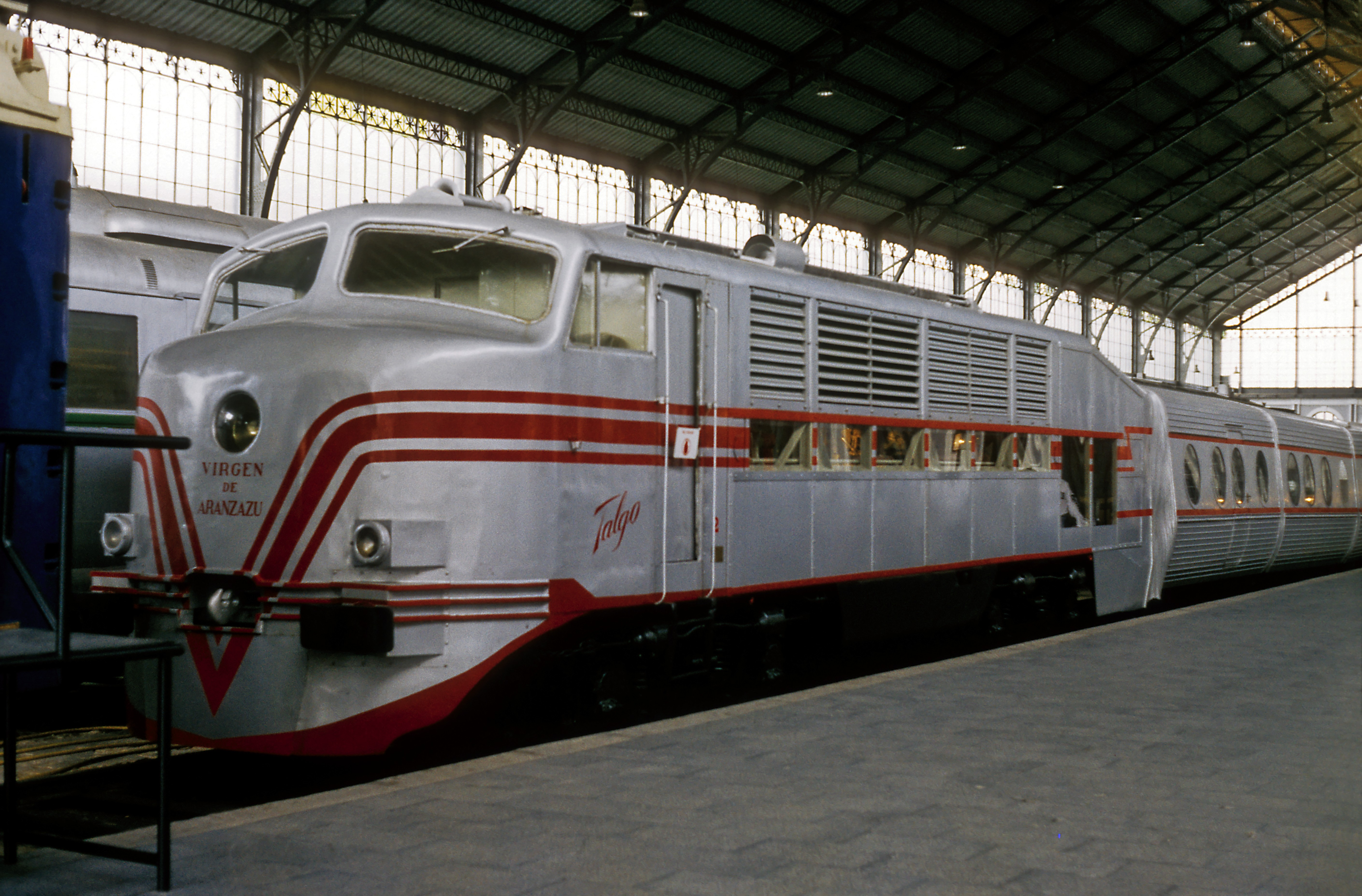 Eisenbahnmuseum Madrid Delicias, Lok der späteren BR 350, Ursprungszustand für (und mit) Talgo II